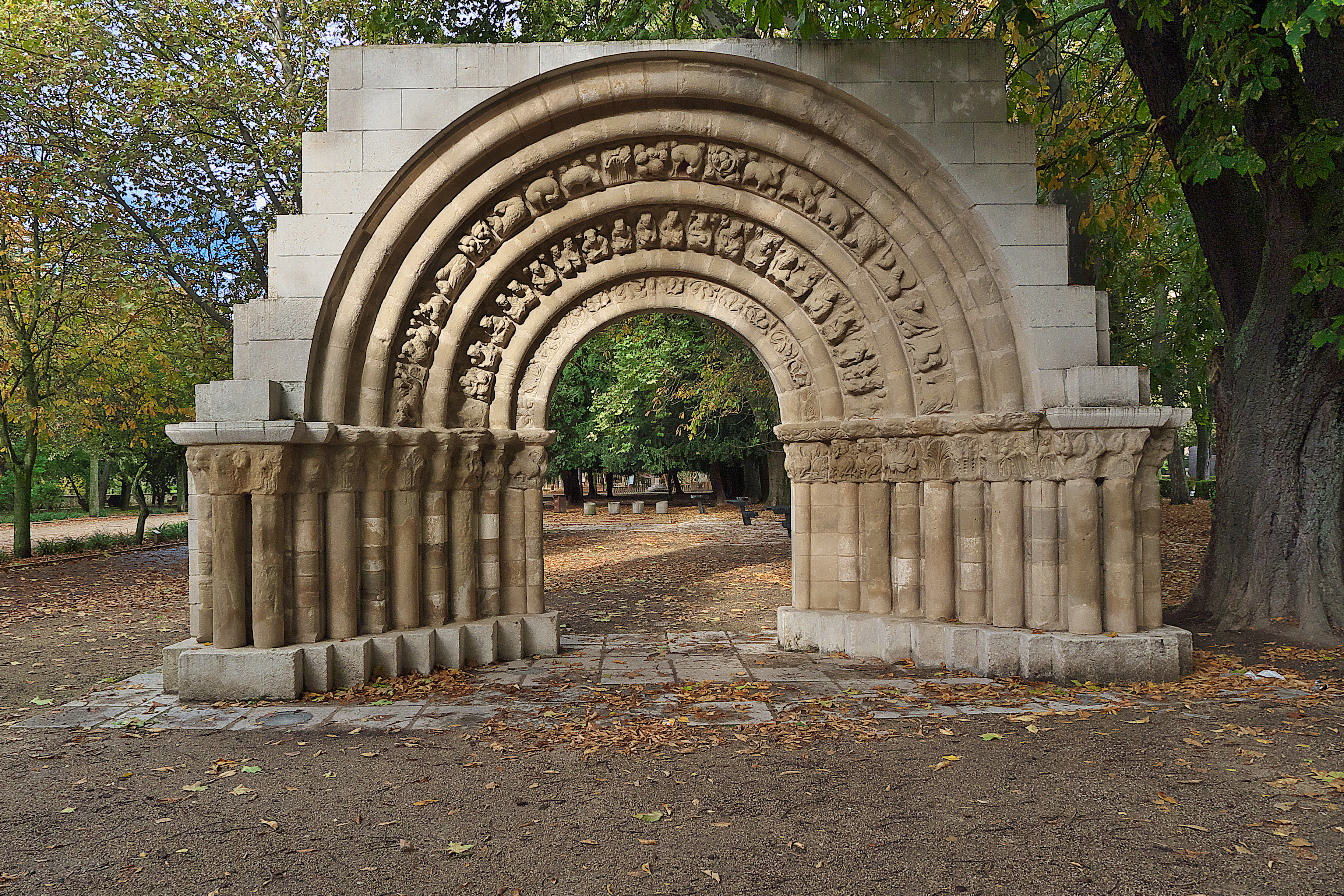 Portada (s. XII) de la desaparecida iglesia de Cerezo de Río Tirón (Burgos), afortunadamente recuperada (1932) en este Paseo de la Isla (Burgos). También procedente de esta iglesia, se expone un grupo escultórico en el The Cloisters, Museo Metropolitano de Arte de Nueva York.